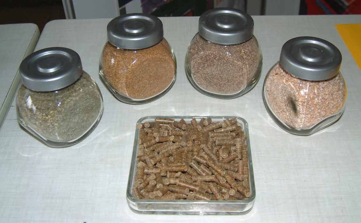 Beschreibung: Rohstoffe zur Herstellung von Futtermittel-Pellets für Pferde Fotograf: Benutzer:BMK 2004 Please send reference and voucher copy to BMK(at)clever.ms Bitte Quellenangabe und Beleg an BMK(at)clever.ms